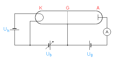 Prinzipschaltbild des Franck-Hertz Versuches